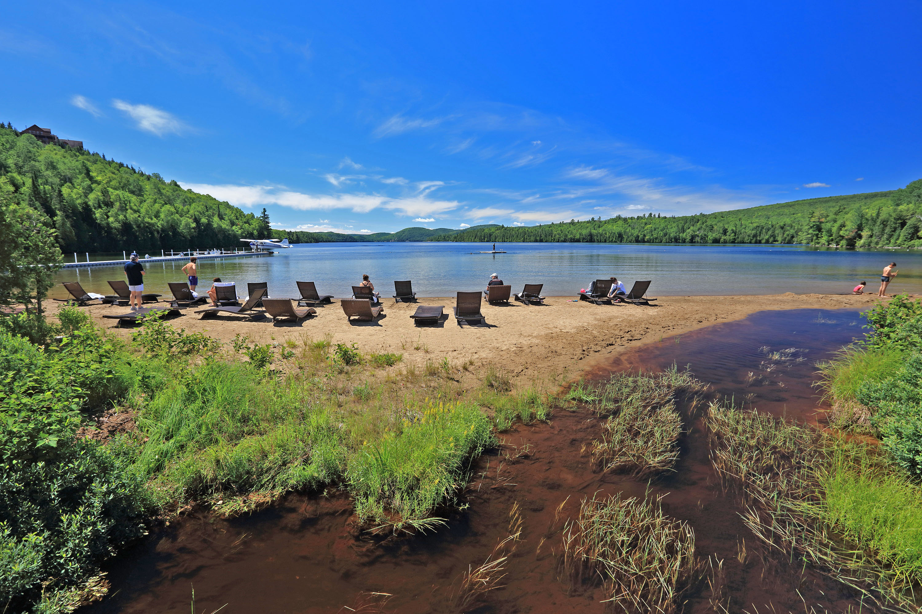 Resort Sacacomie